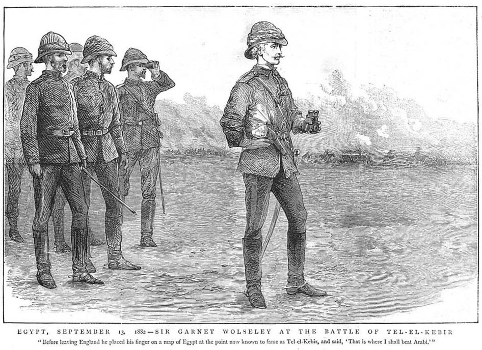 Il generale Garnet Wolsely e i suoi ufficiali alla battaglia di Tell el-Kebir